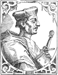 Matteo Schiner (1465-1522), cardinale. Silografia di Tobias Stimmer (1539-1584) da Paulus Jovius, Elogia virorum bellica virtute illustrium, Basilea 1575, liber V, pagina 249. Berna, Biblioteca cittadina e universitaria